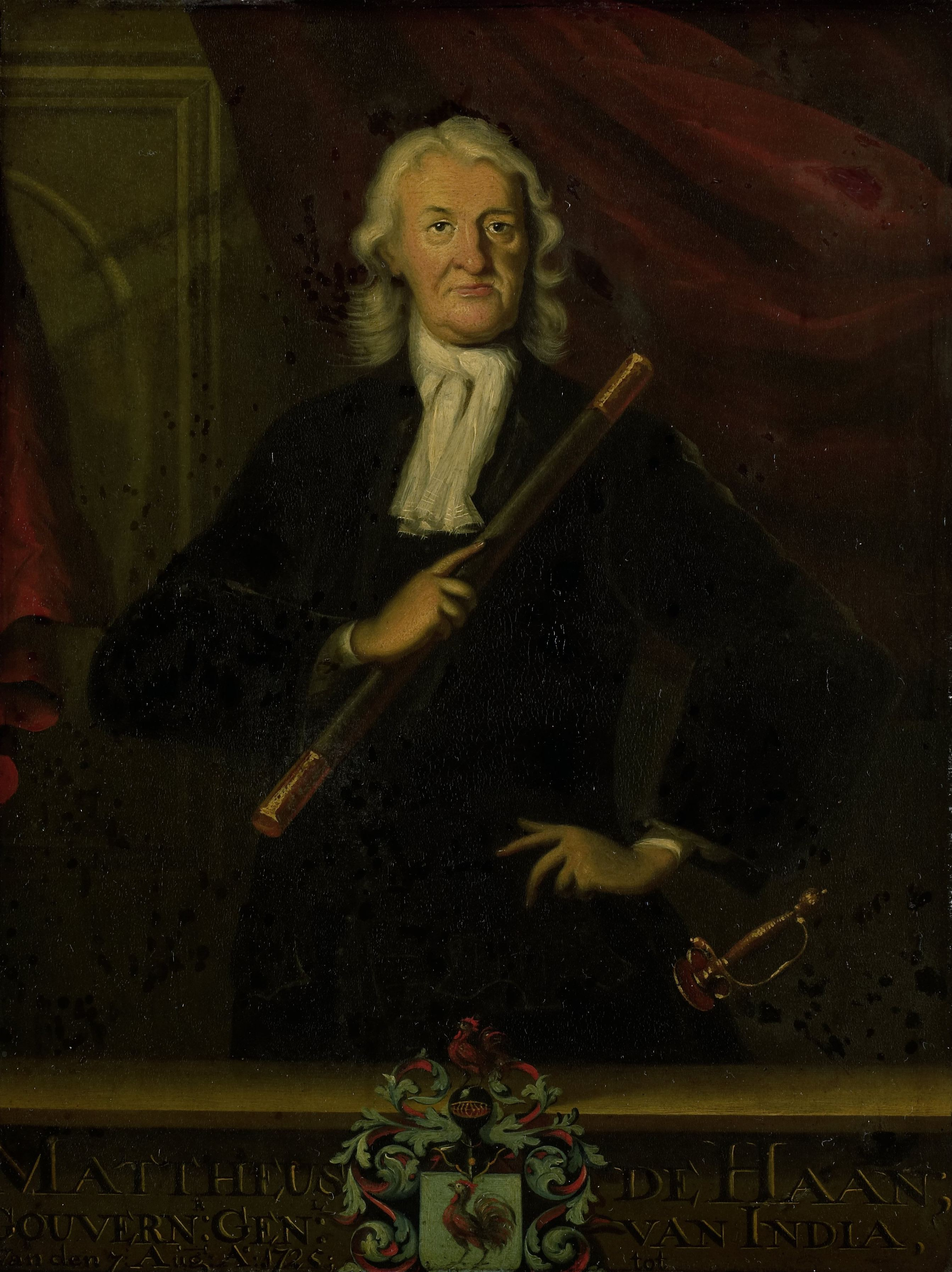 Portret van Mattheus de Haan (1663-1729). Gouverneur-generaal (1725-29). Staande, ten halven lijve, commandostaf in de rechterhand, de linkerhand in de zij. Onderdeel van een reeks van kopieën naar portretten van de gouverneurs-generaal van het voormalige Nederlands Oost-Indië, waarschijnlijk afkomstig van de Verenigde Oostindische Compagnie. Kopie naar SK-A-3774. Collection: schilderijen; Gouverneurs-generaal serie